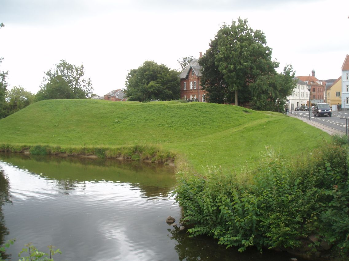 Nyborg Vold i Nyborg